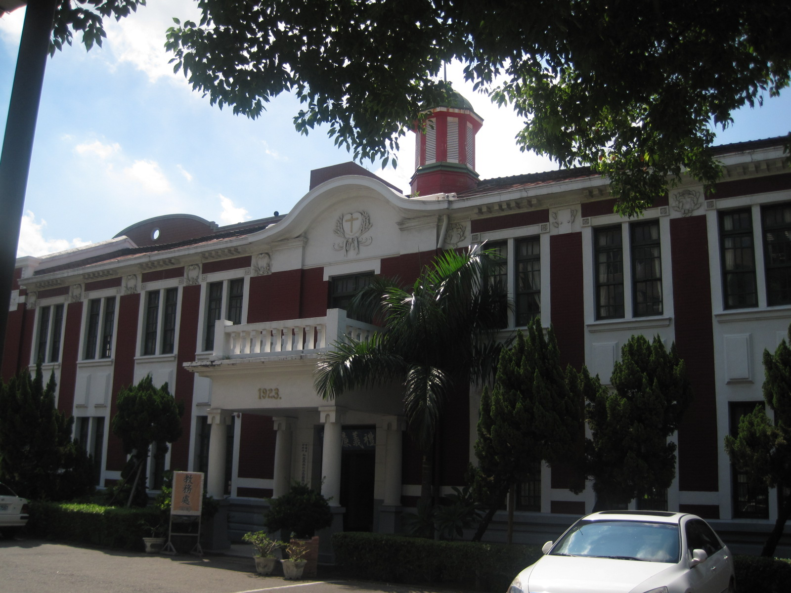 長榮女中行政大樓